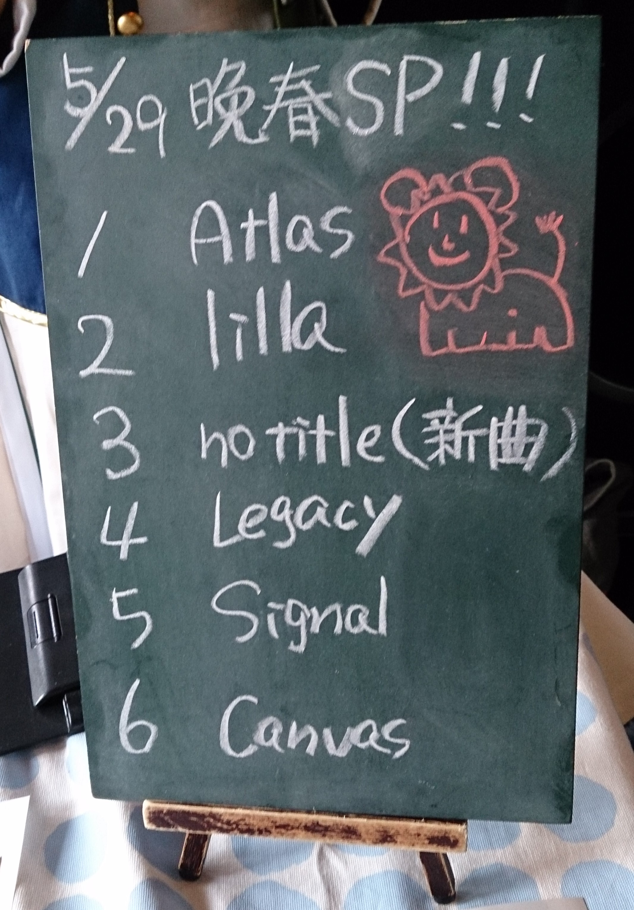 amiinAセトリボード(20160529(1))